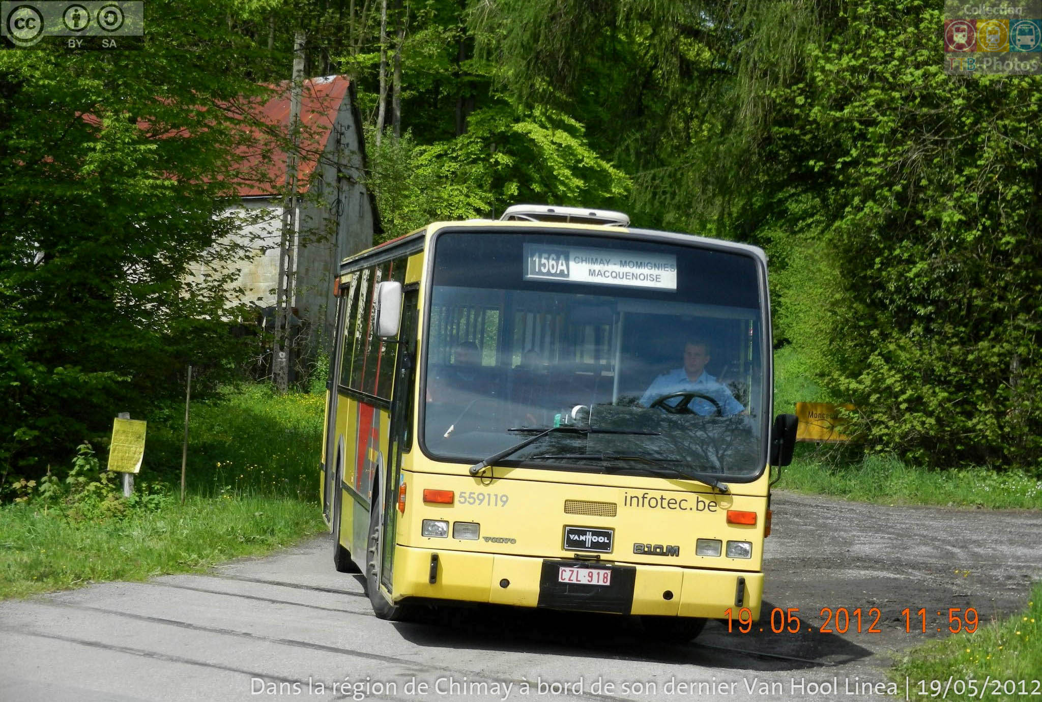 Ets G. Liénard&Cie 559119 - Ligne 156a vers Momignies Seloignes, route de Monceau - 19 mai 2012 Van Hool Linea Volvo B10M (26/06/1995)